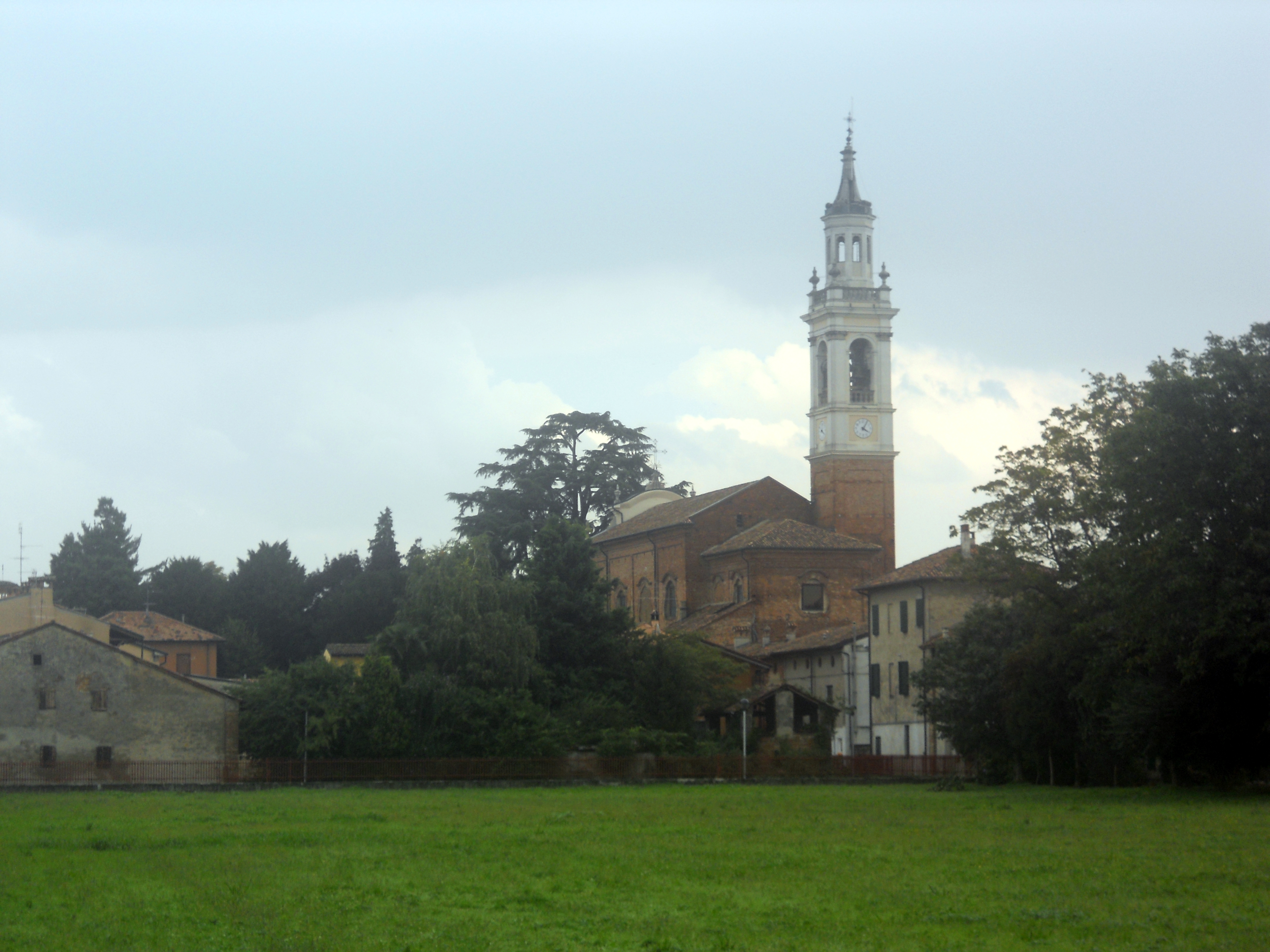 Vista di Ripalta Nuova, frazione del comune italiano di Ripalta Cremasca.